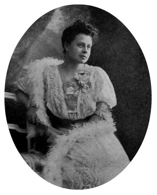 Татаьяна Ивановна Медем, ур. Горемыкина (1872—1965)